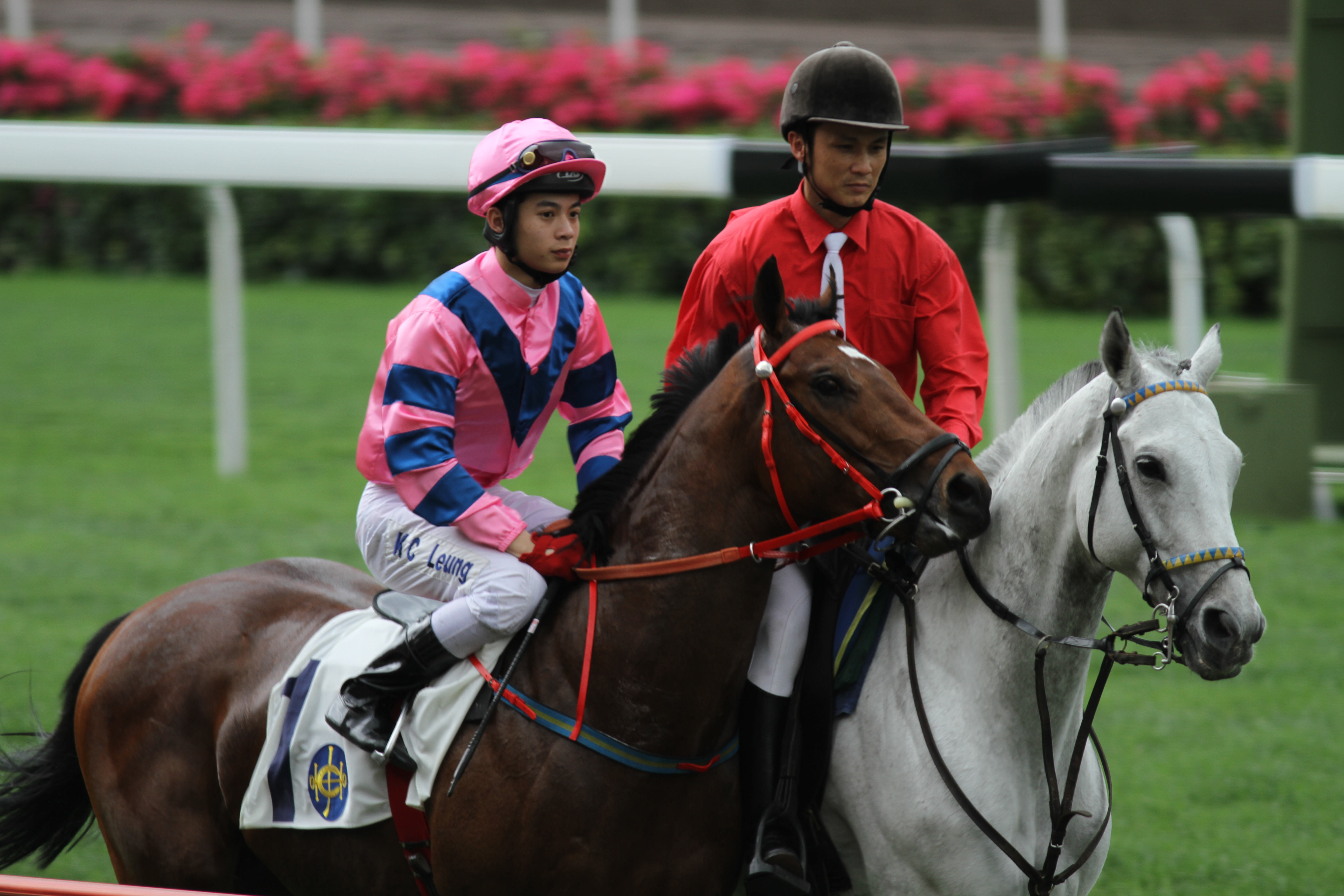 香港騎師梁家俊，攝於沙田馬場